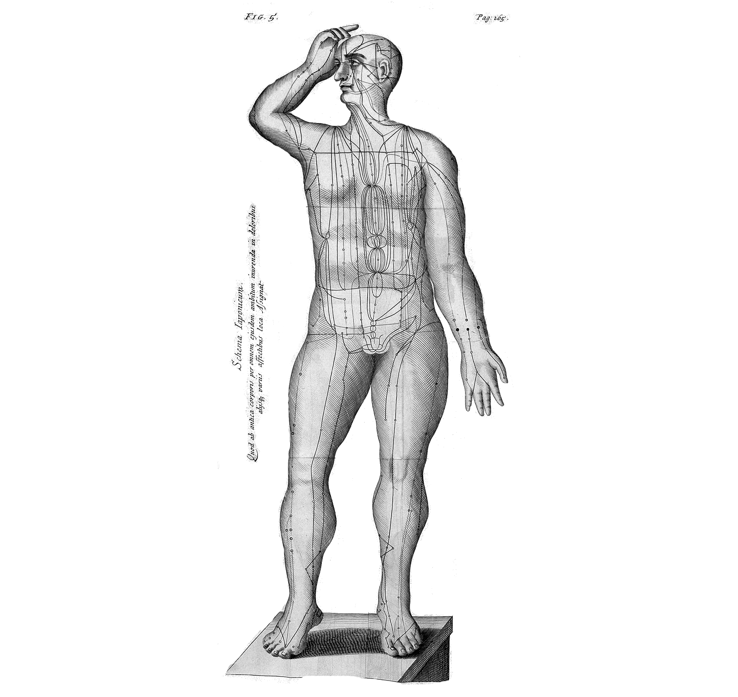 Abbildung von Akupunkturpunkten